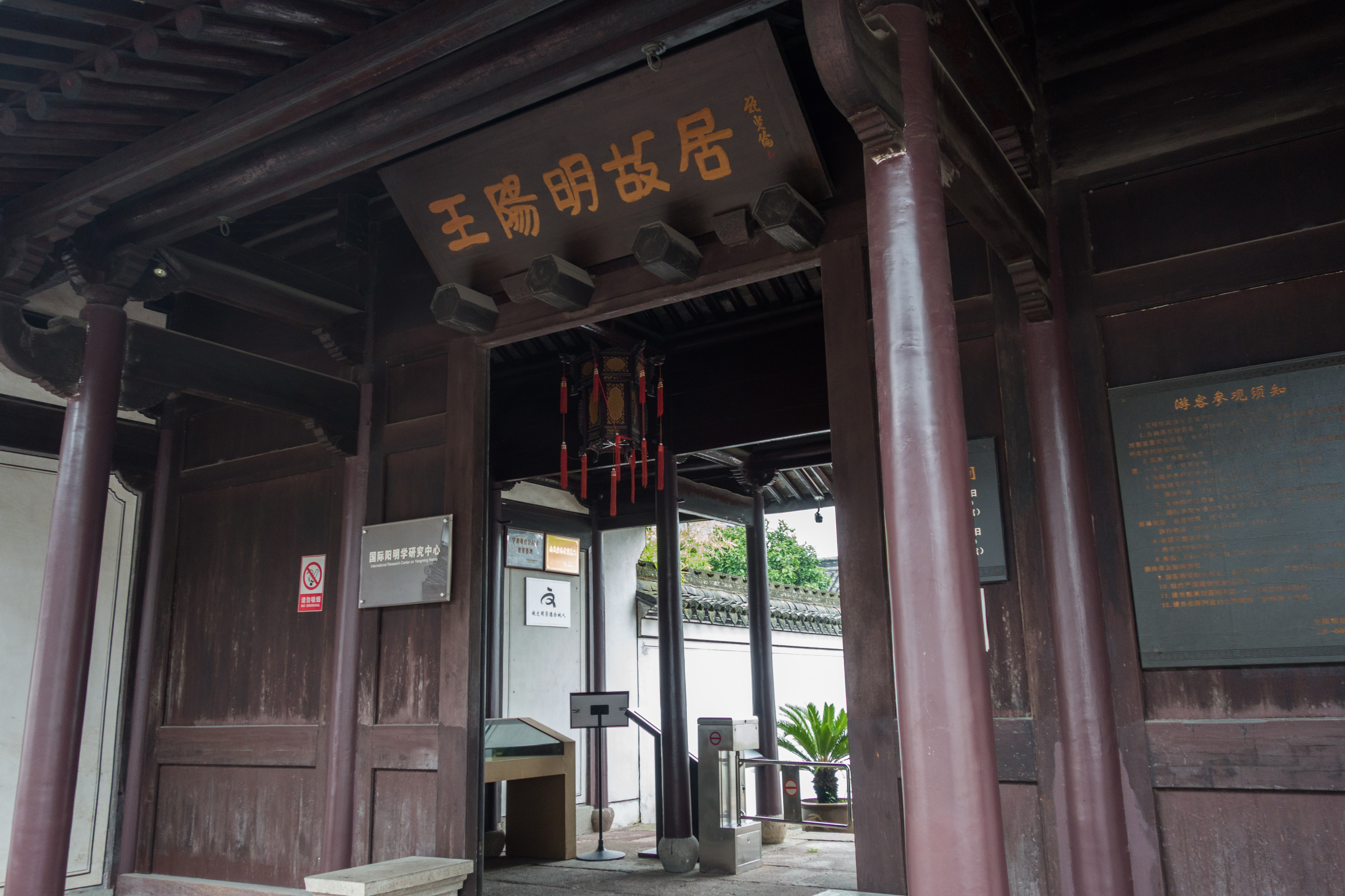 余姚王守仁故居